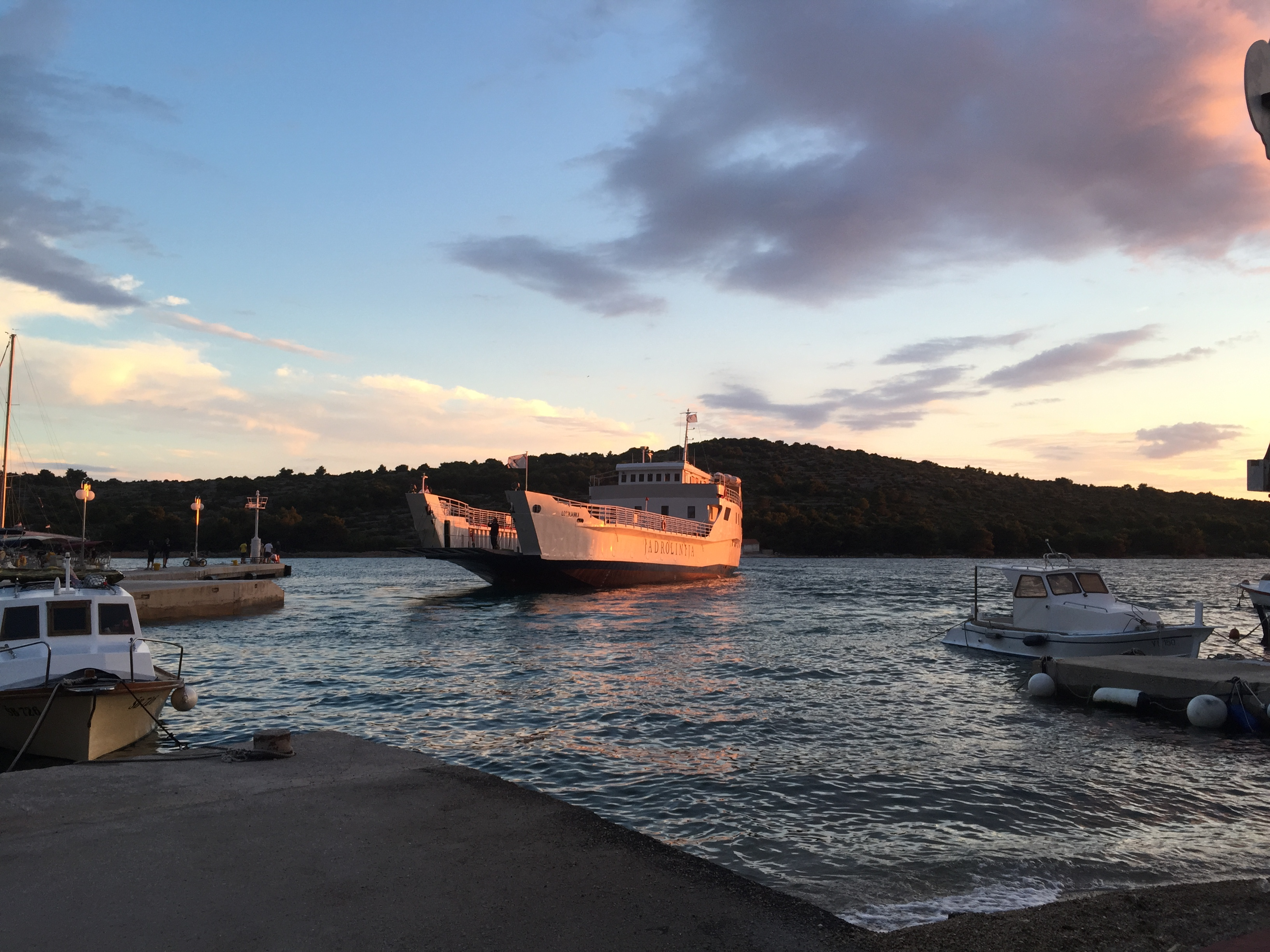 Kaprije, Croatia